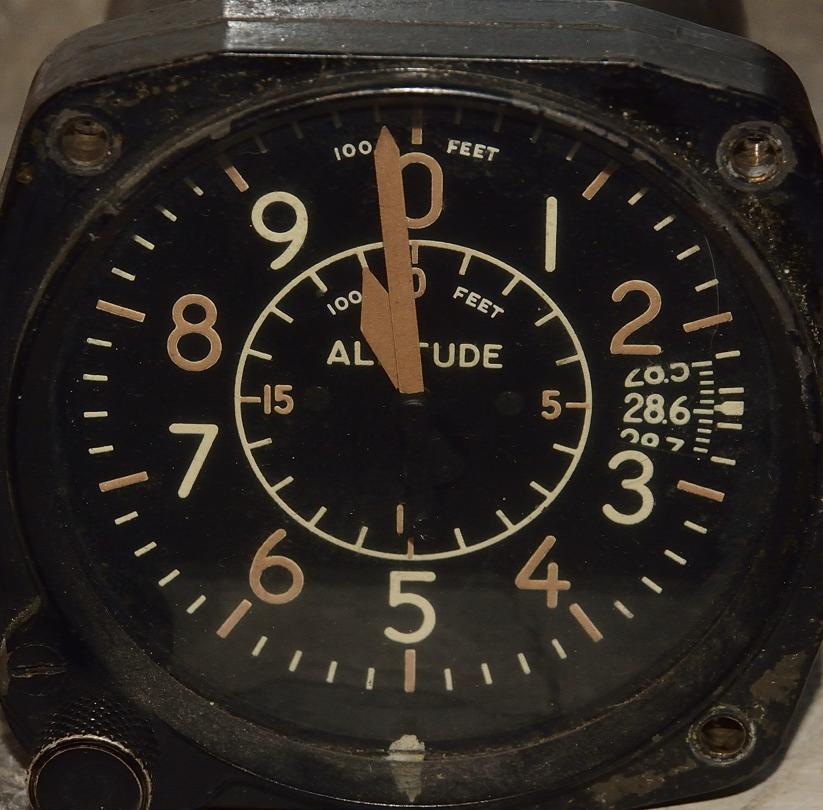 Wysokościomierz z brytyjskiego samolotu myśliwskiego